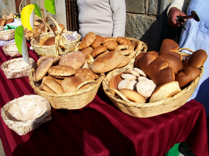 Bizcochos y panes de piso y agua elaborados en la ciudad ancashina de Chacas.